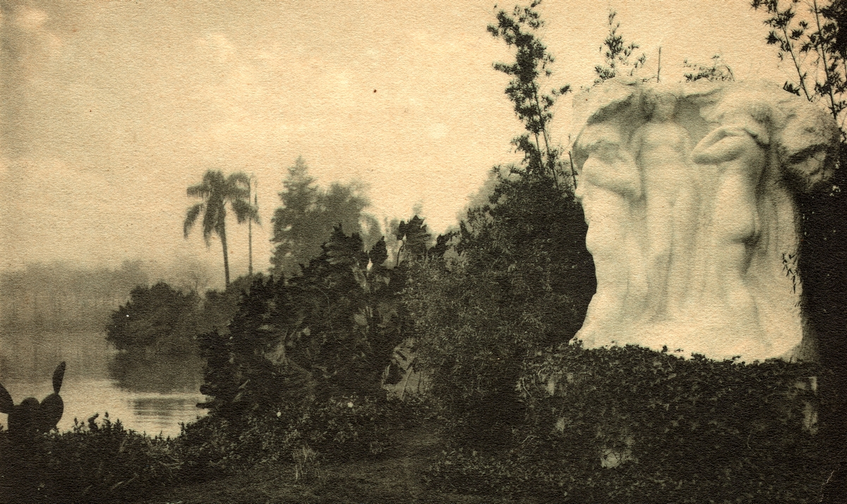 Groupe sculptée " La primavera " Buenos Airès ( Argentine ) Av. Adolfo Berro - Par léon Ernest Drivier - Année 30 - Carte postale originale